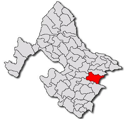 Categorie:Hărţi ale judeţului Mehedinţi